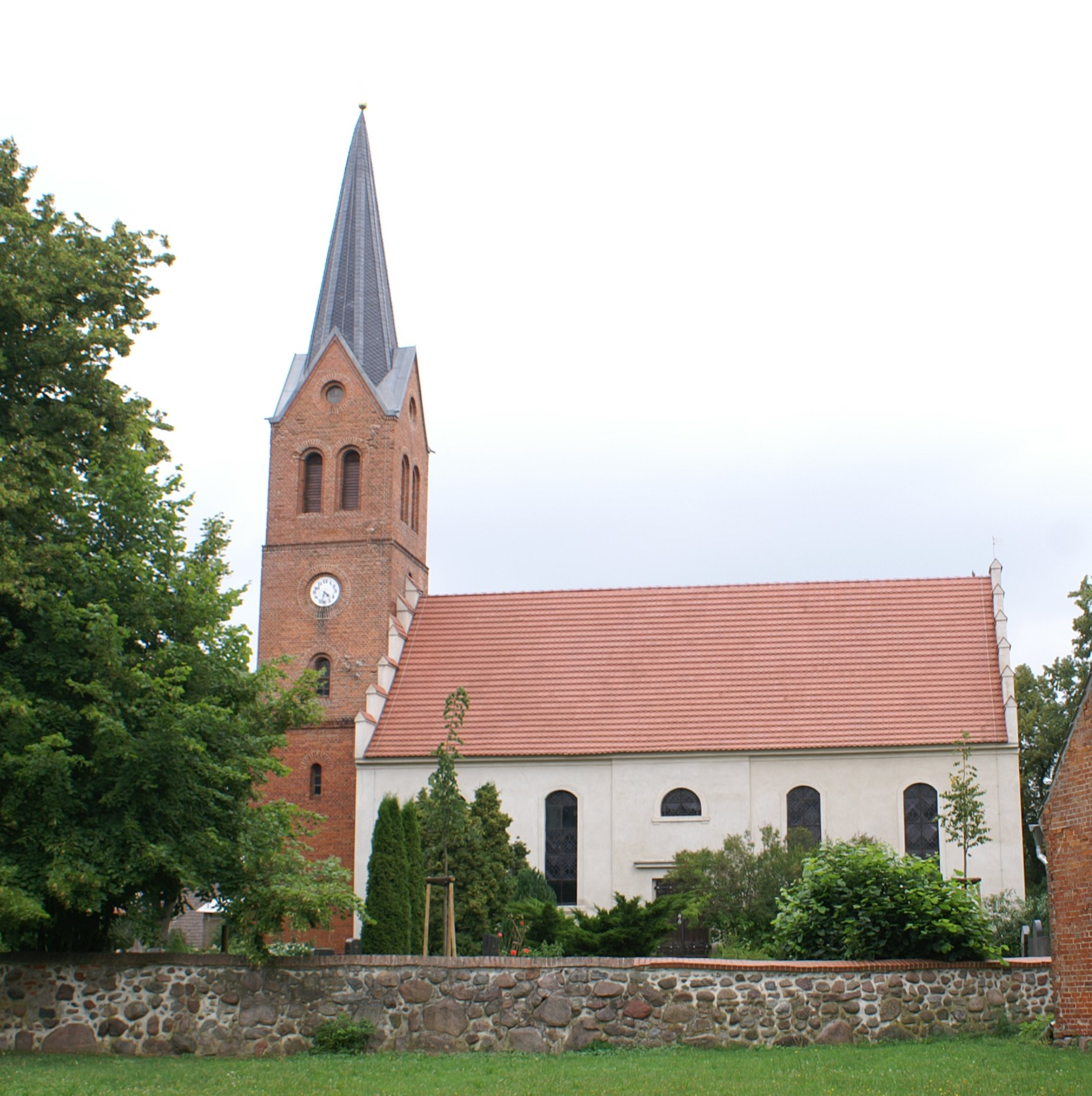 Grischow bei Altentreptow im Landkreis Demmin - Südseite der Kirche